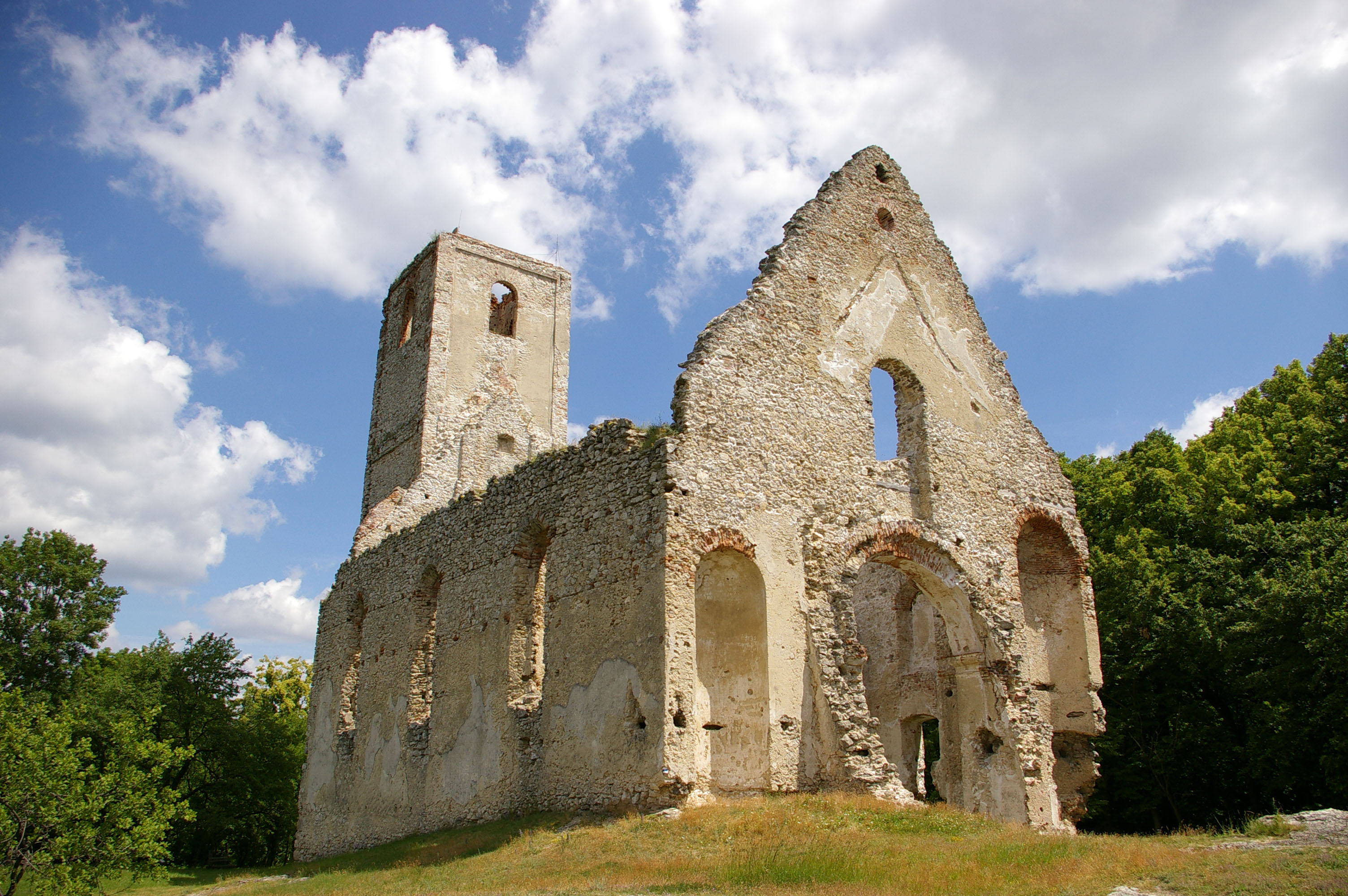 Katarínka. Zrúcanina kostola a kláštora sv. Kataríny.